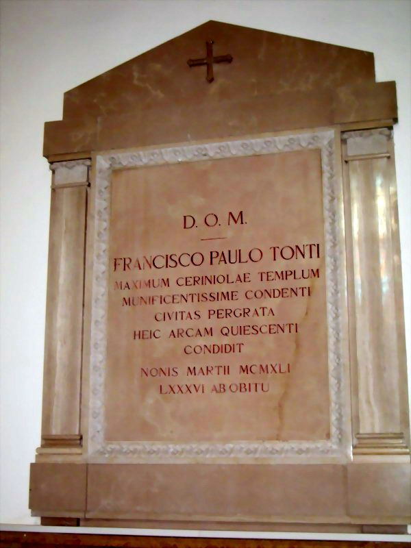 lapide in memoria di Paolo Tonti.